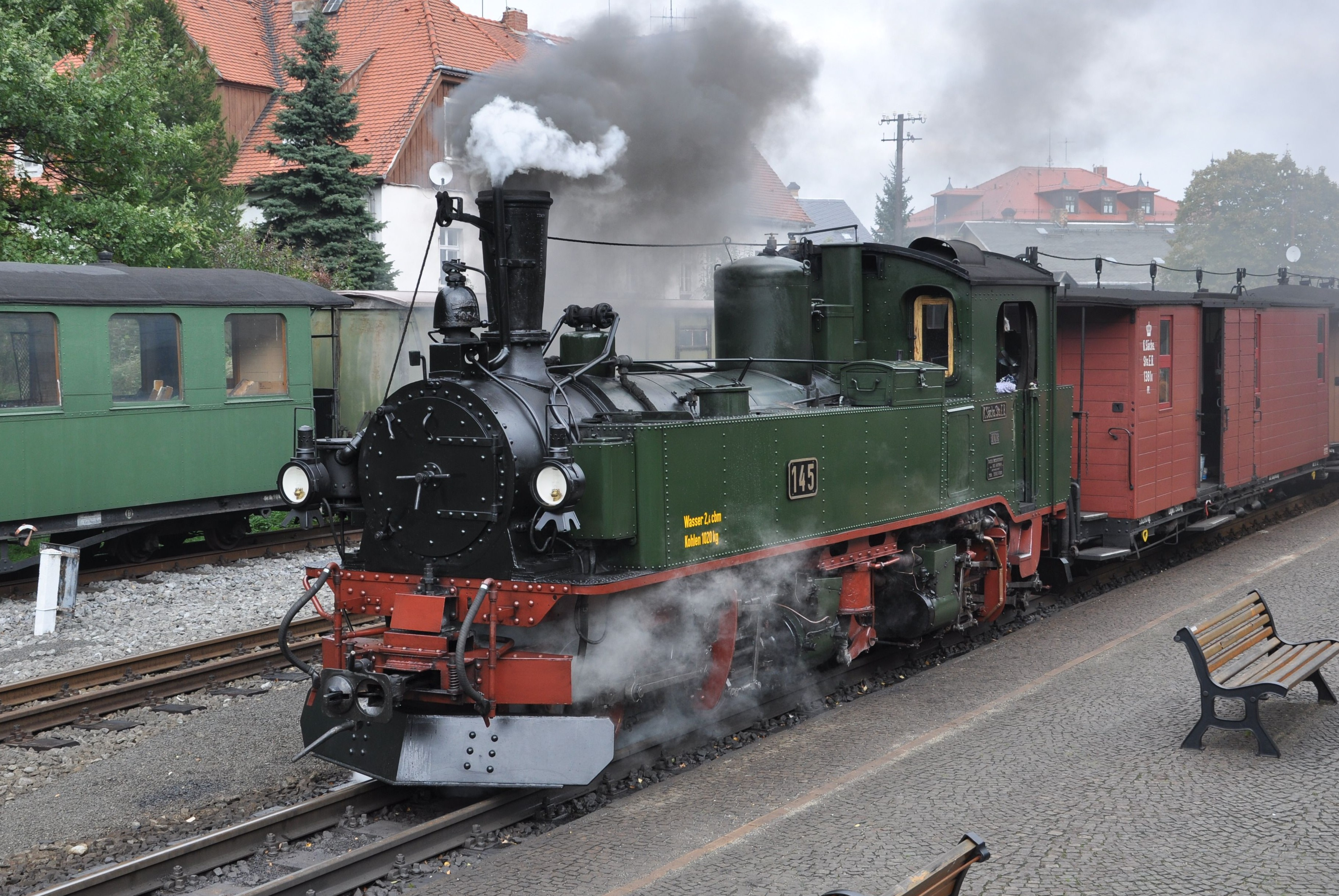 Lokomotive 99 555 (sä. 145) vor dem Hundertjährigen Zug der SOEG im Bahnhof Bertsdorf